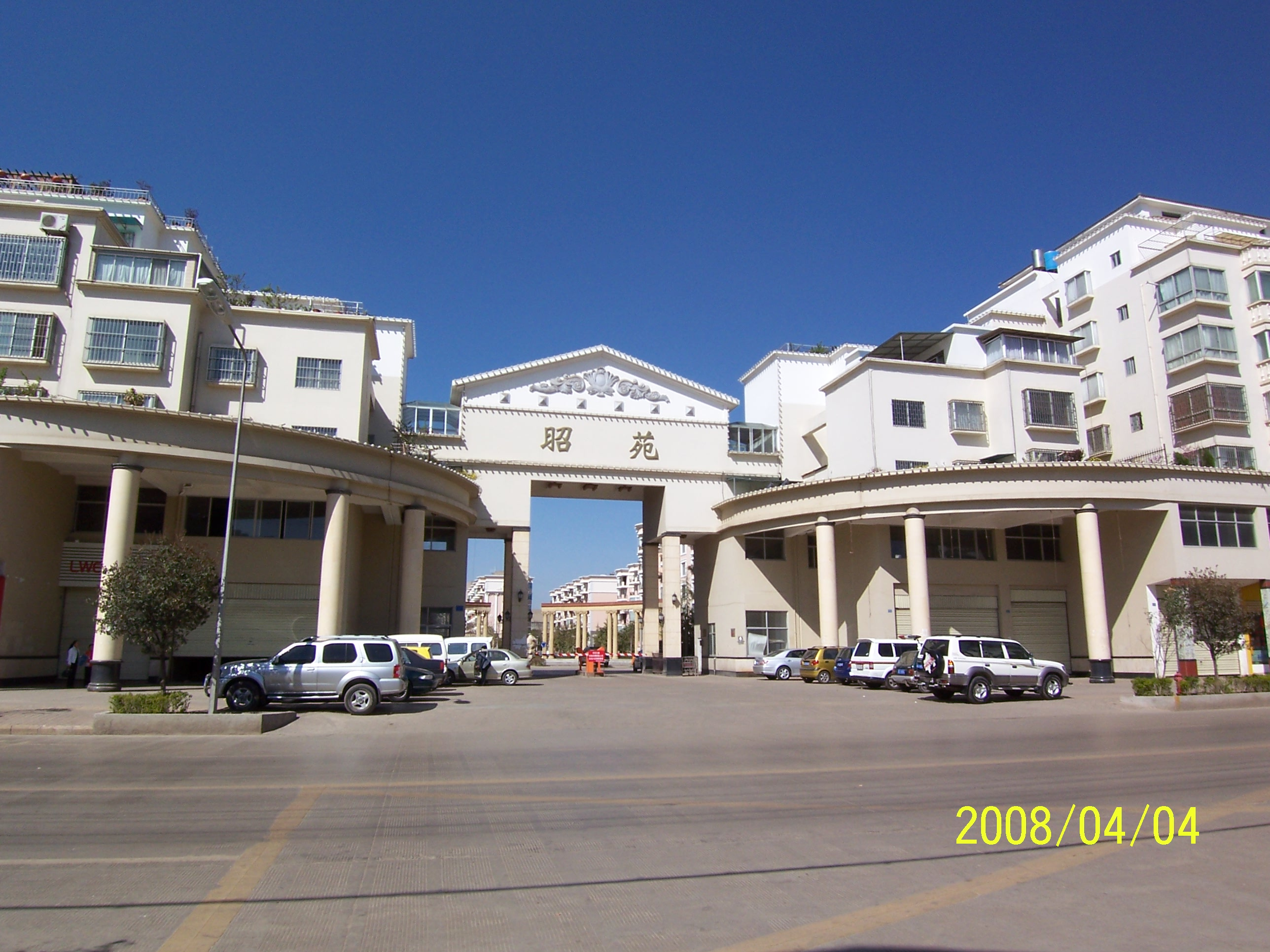 昭苑小区